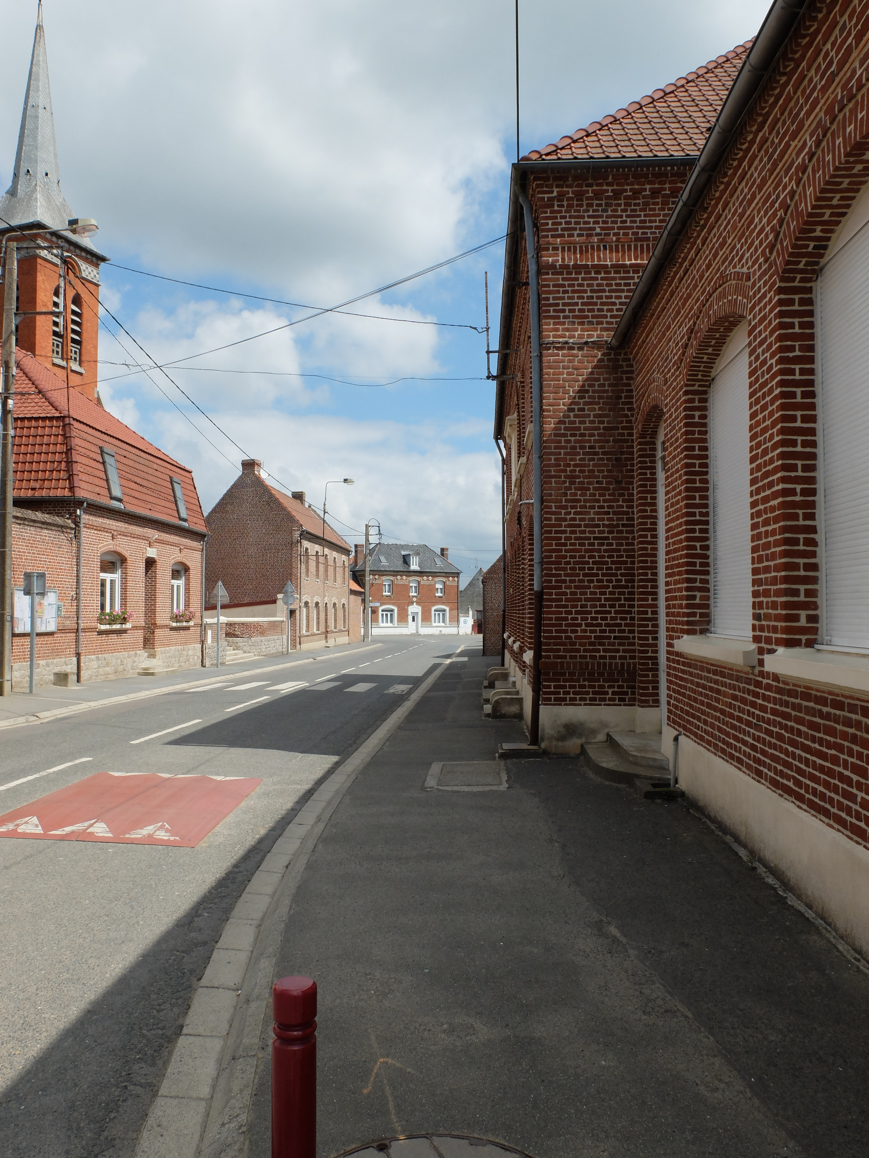 Vue de la rue de la mairie de Noyelles-sous-Bellonne.